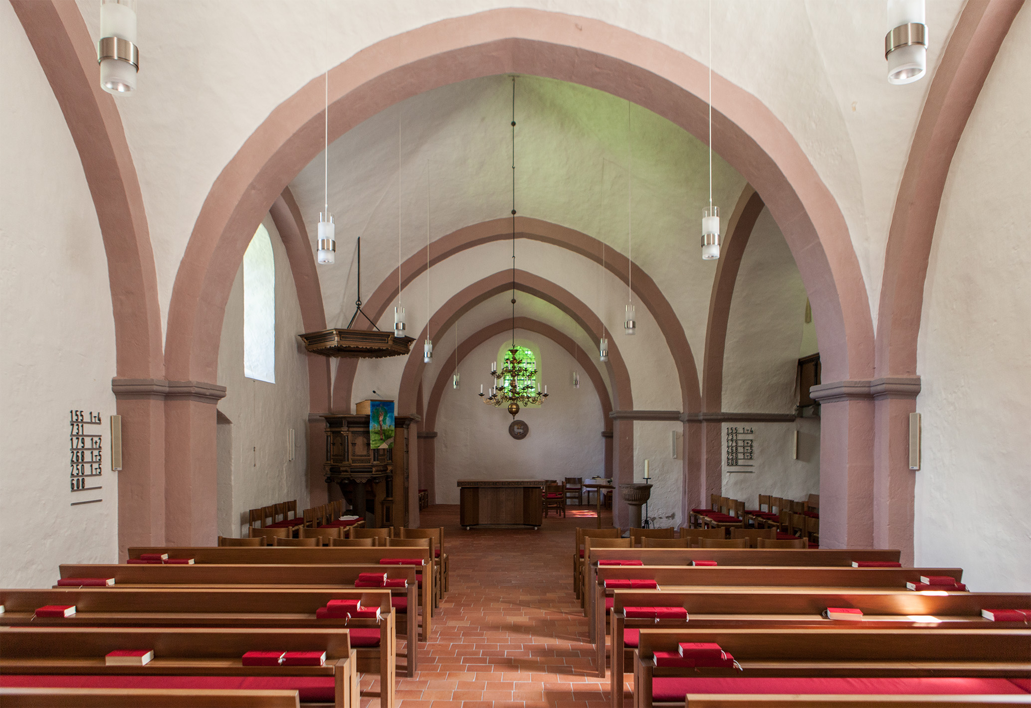 Evangelische Kirche Reelkirchen, Innenraum